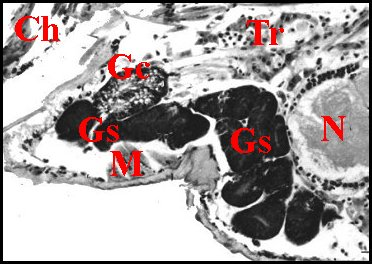 Glandes gnathocoxales en coupe parasagittale du prosoma de Linyphia triangularis mâle